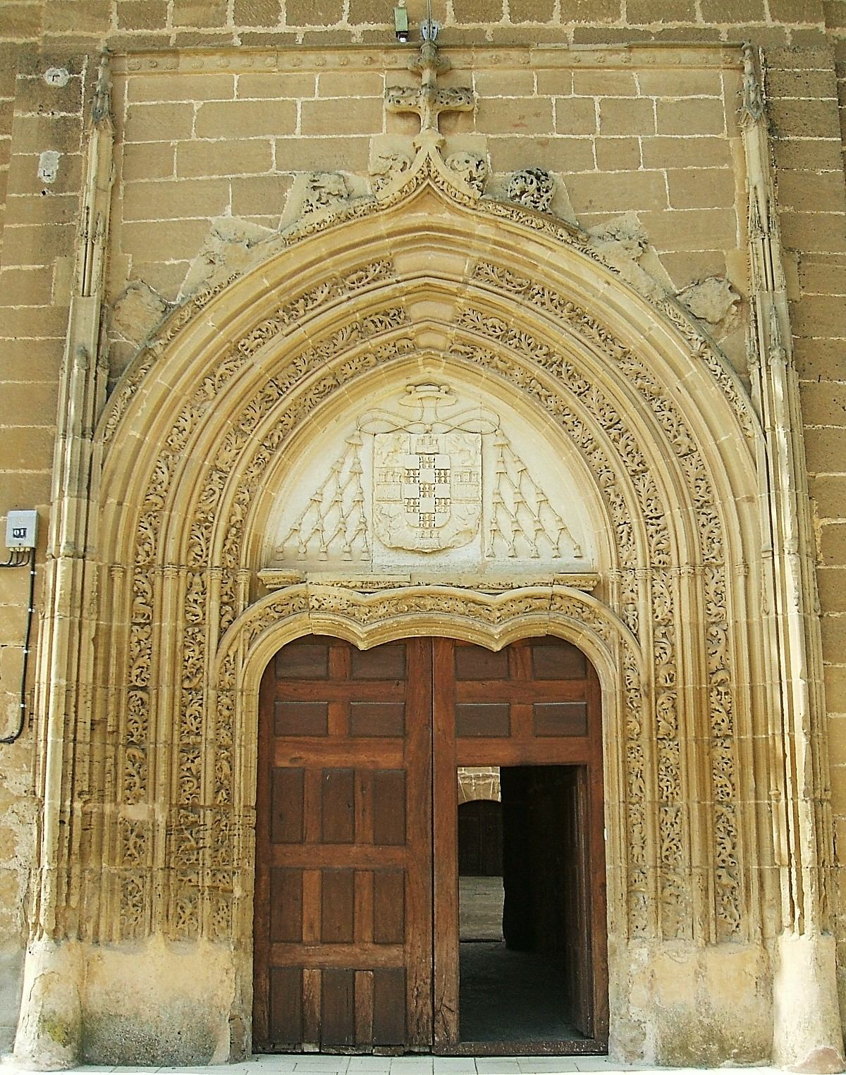 Portada gótica flamígera (siglo XVI) de acceso al Monasterio de monjas dominicas de Nuestra Señora de la Piedad, en Casalarreina, La Rioja, España/Spain